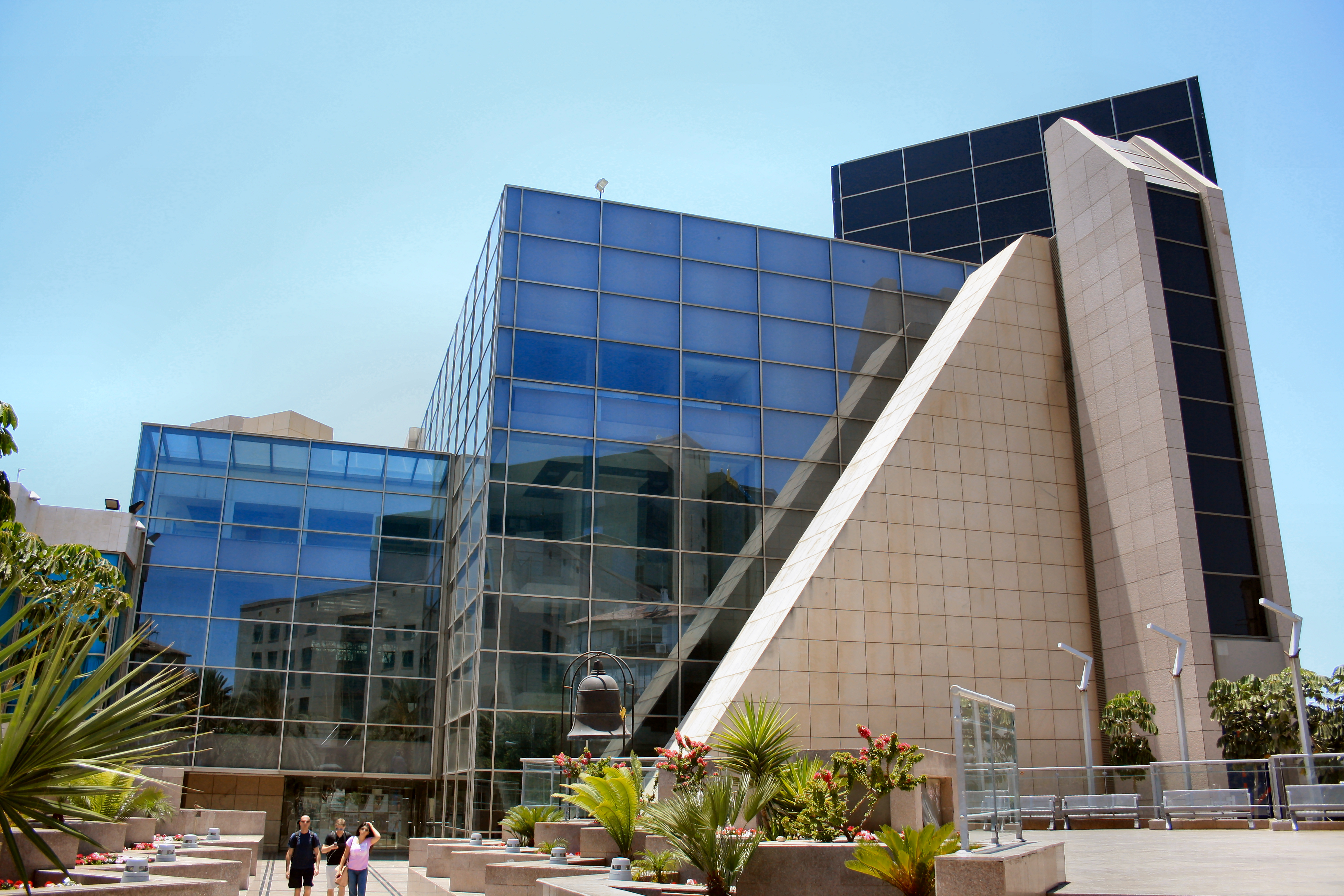 היכל התרבות ראשון לציון